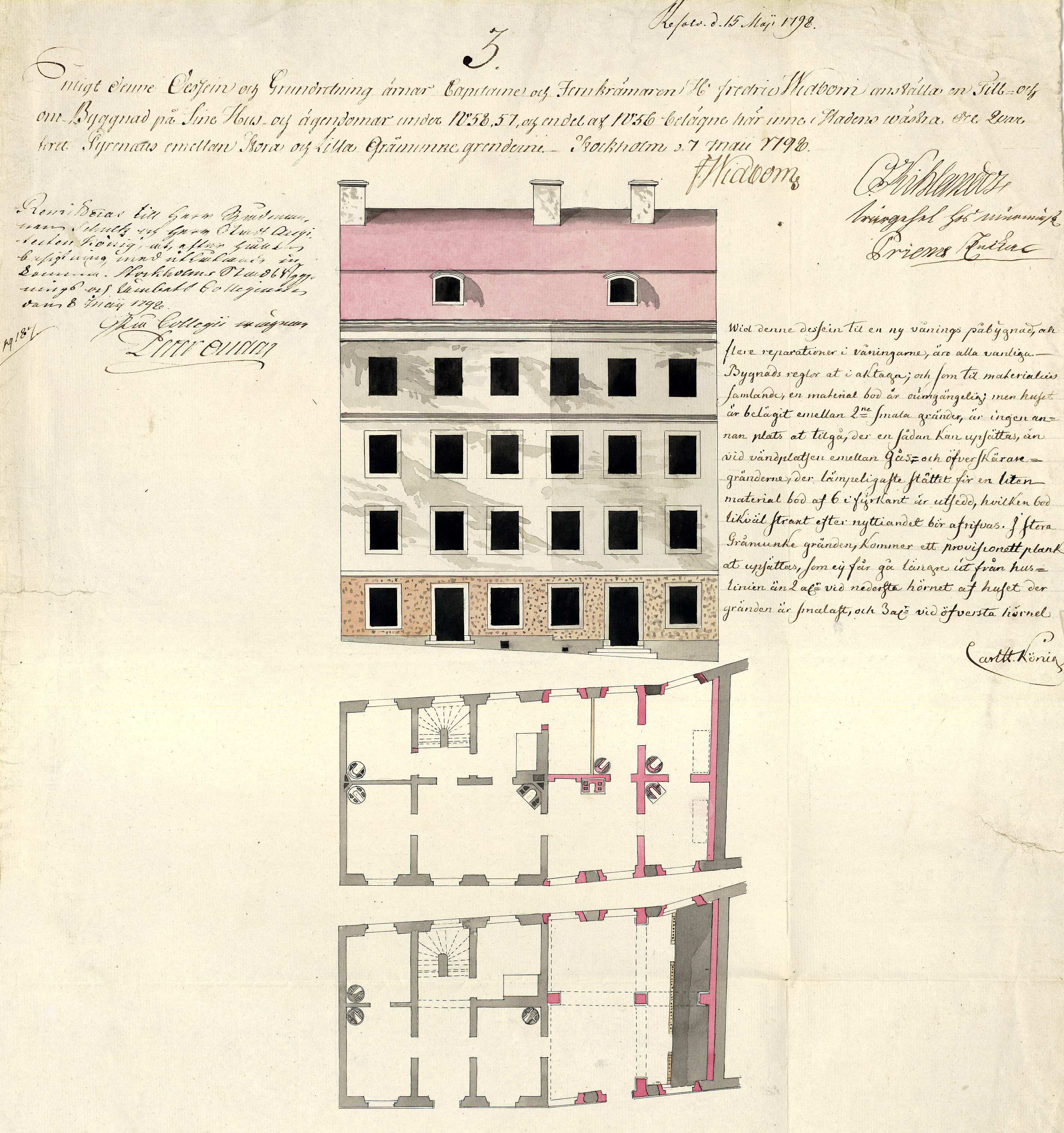 Ombyggnadsritning för huset vid Stora Gråmunkegränd 3